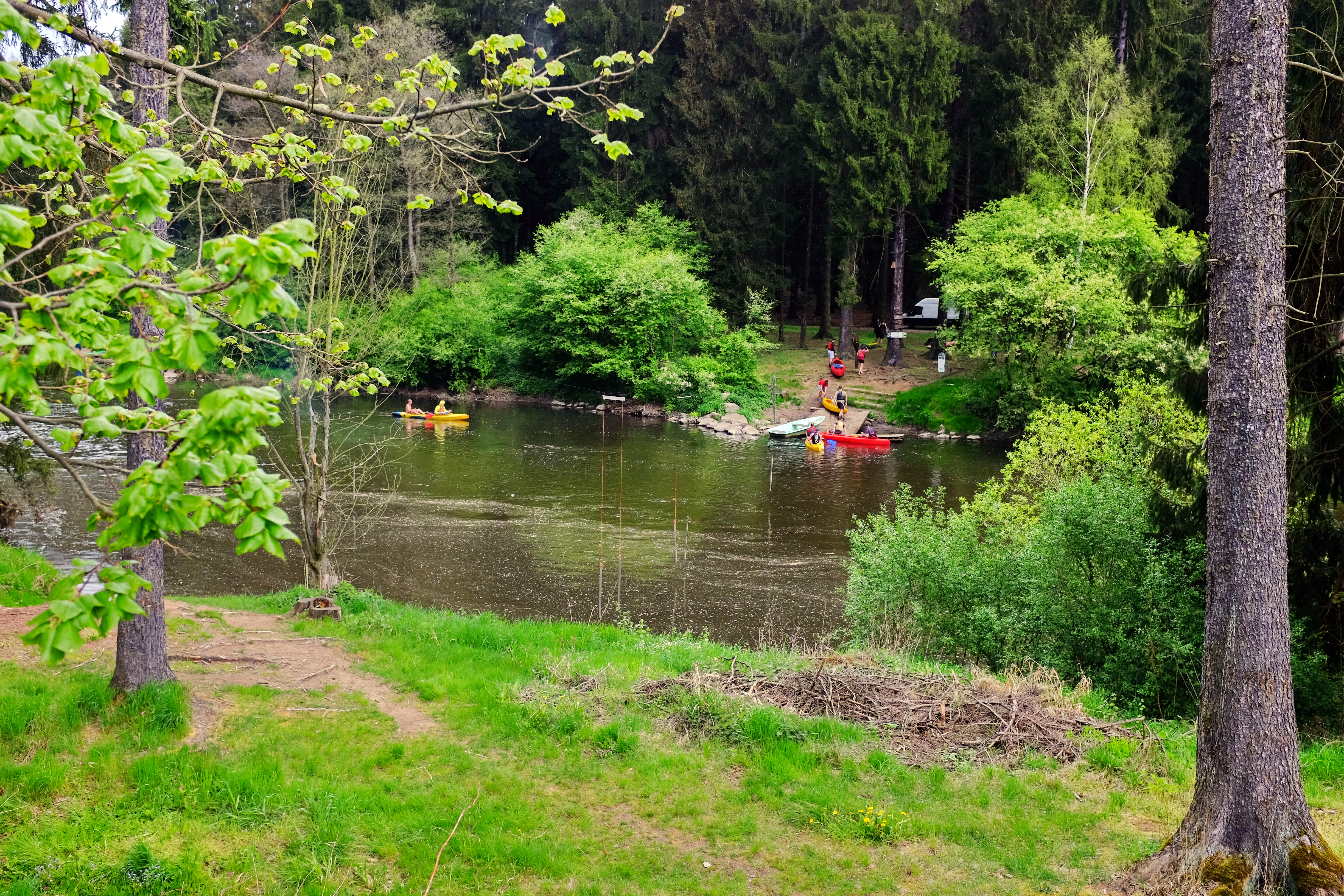 Ohře - u cvičné vodácké peřeje u Hubertusu, okres Karlovy Vary